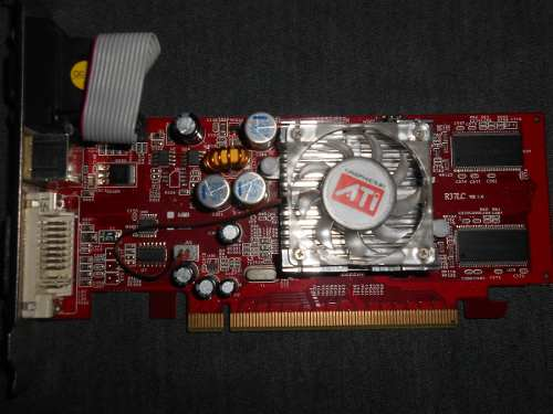 ATI Radeon X300SE comercializada por PowerColor.